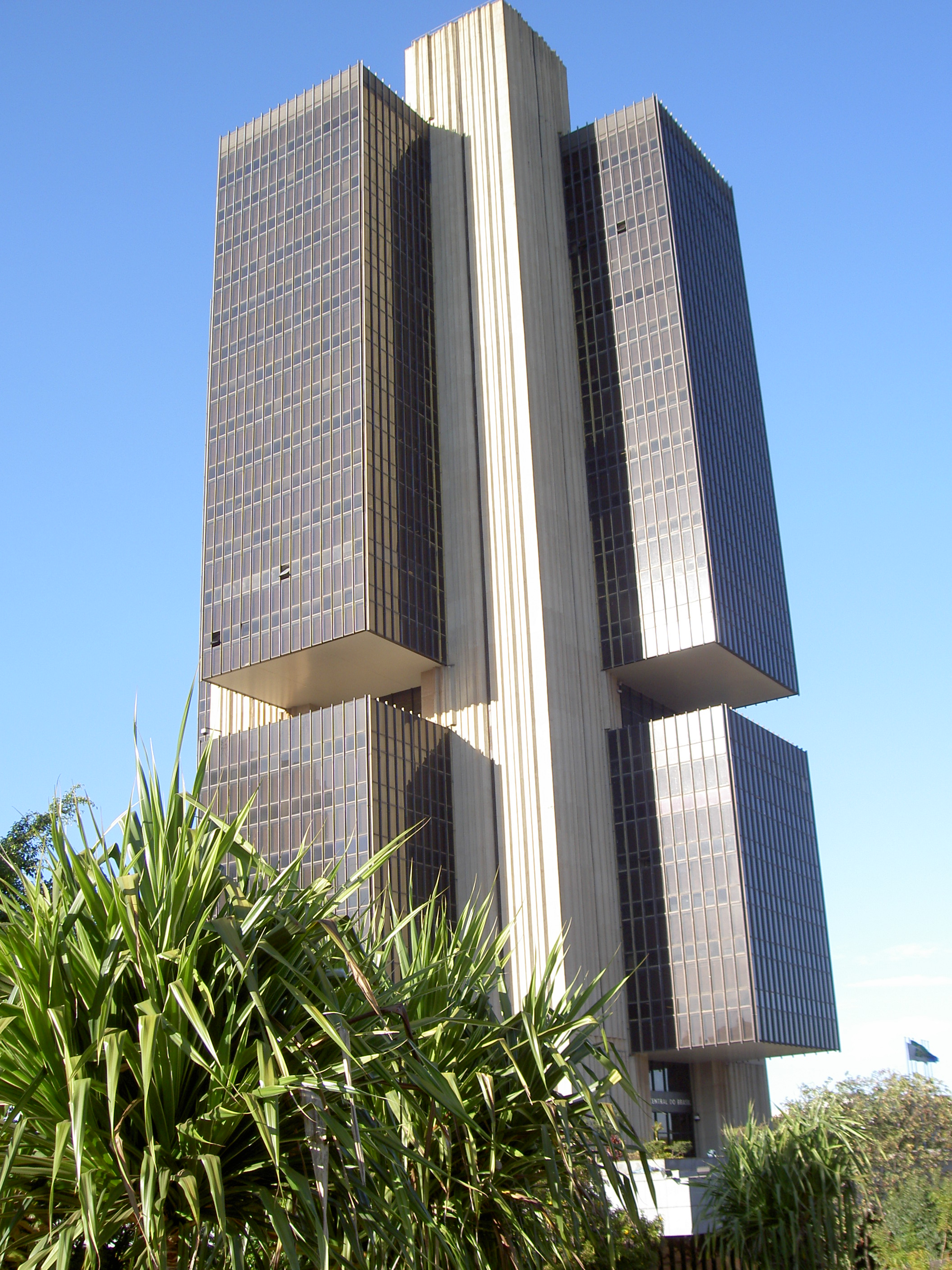 Banco Central do Brasil Центральный банк Бразилии Категория:Изображения:Бразилиа Центральный банк Бразилии BSB-BancoDoBrasil